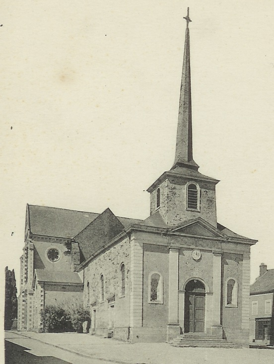 église de la Pouëze (49)